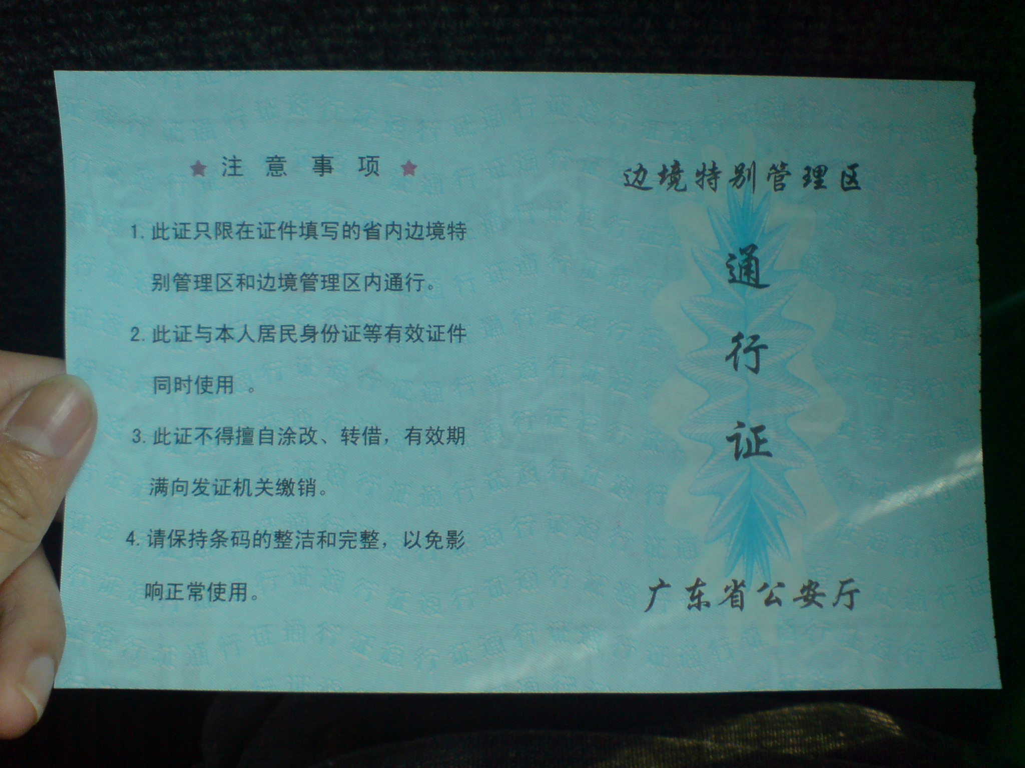 中文（中国大陆）: 进入中英街的边防证